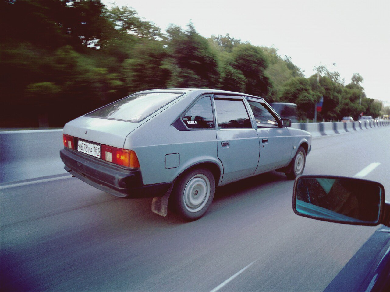 Москвич 2141 1990-го года выпуска.